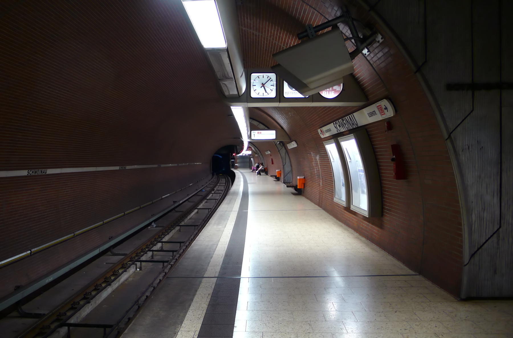 U-Bahnhof Schweinau der U-Bahn Nürnberg, Bahnsteigebene (Gleis 1), Blick von Süden